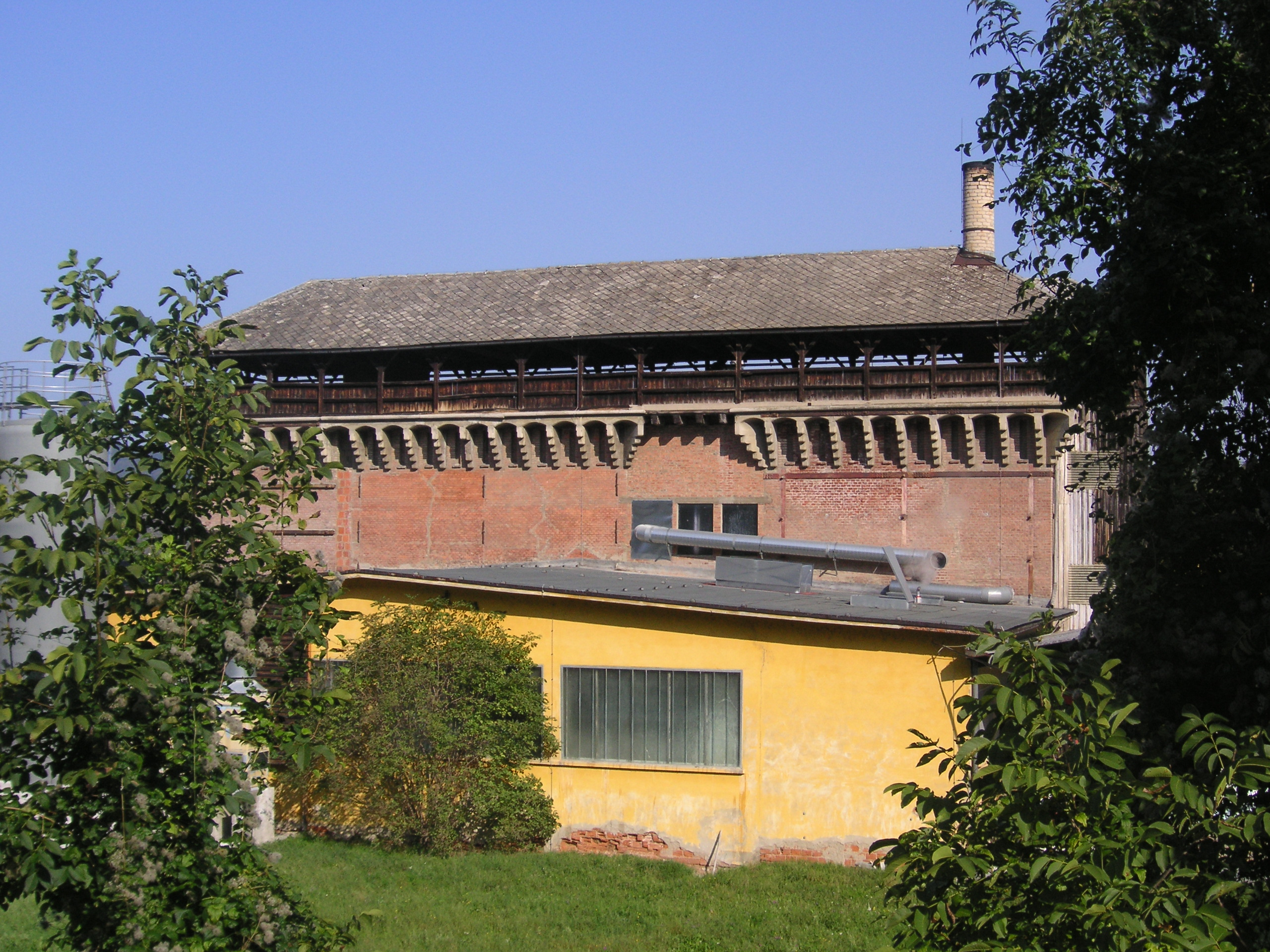 Ehem. Zementofen in Judendorf-Straßengel, Steiermark, Österreich